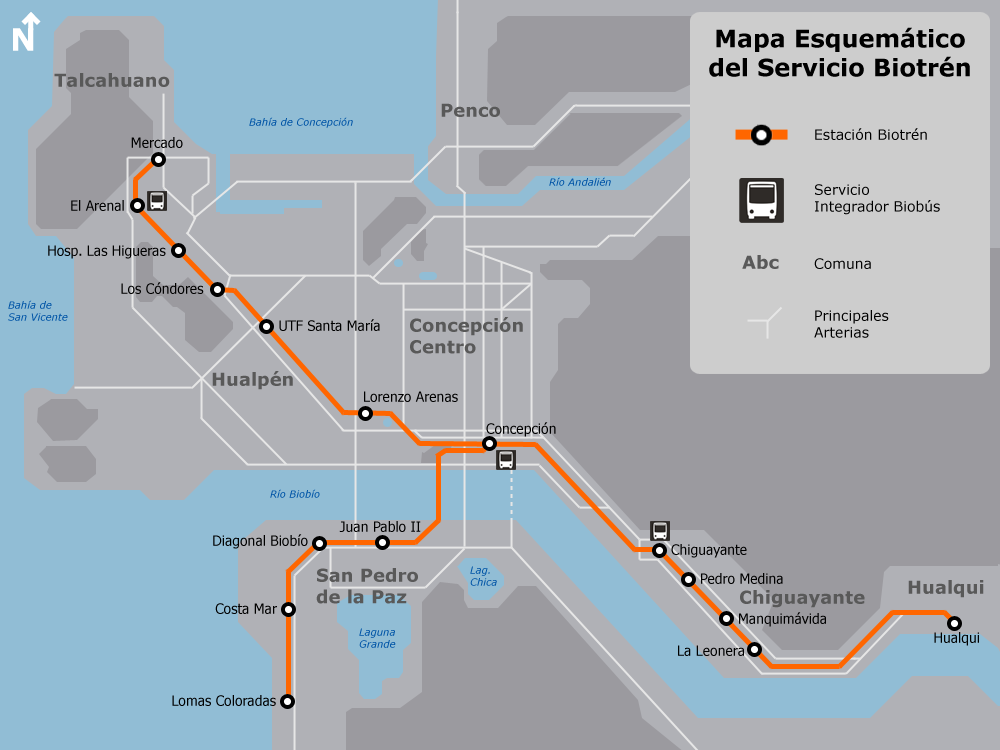 Trabajo Propio. Autor Leocasas